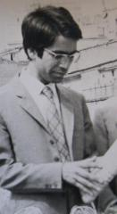 Giornalista italiano, vittima della mafia